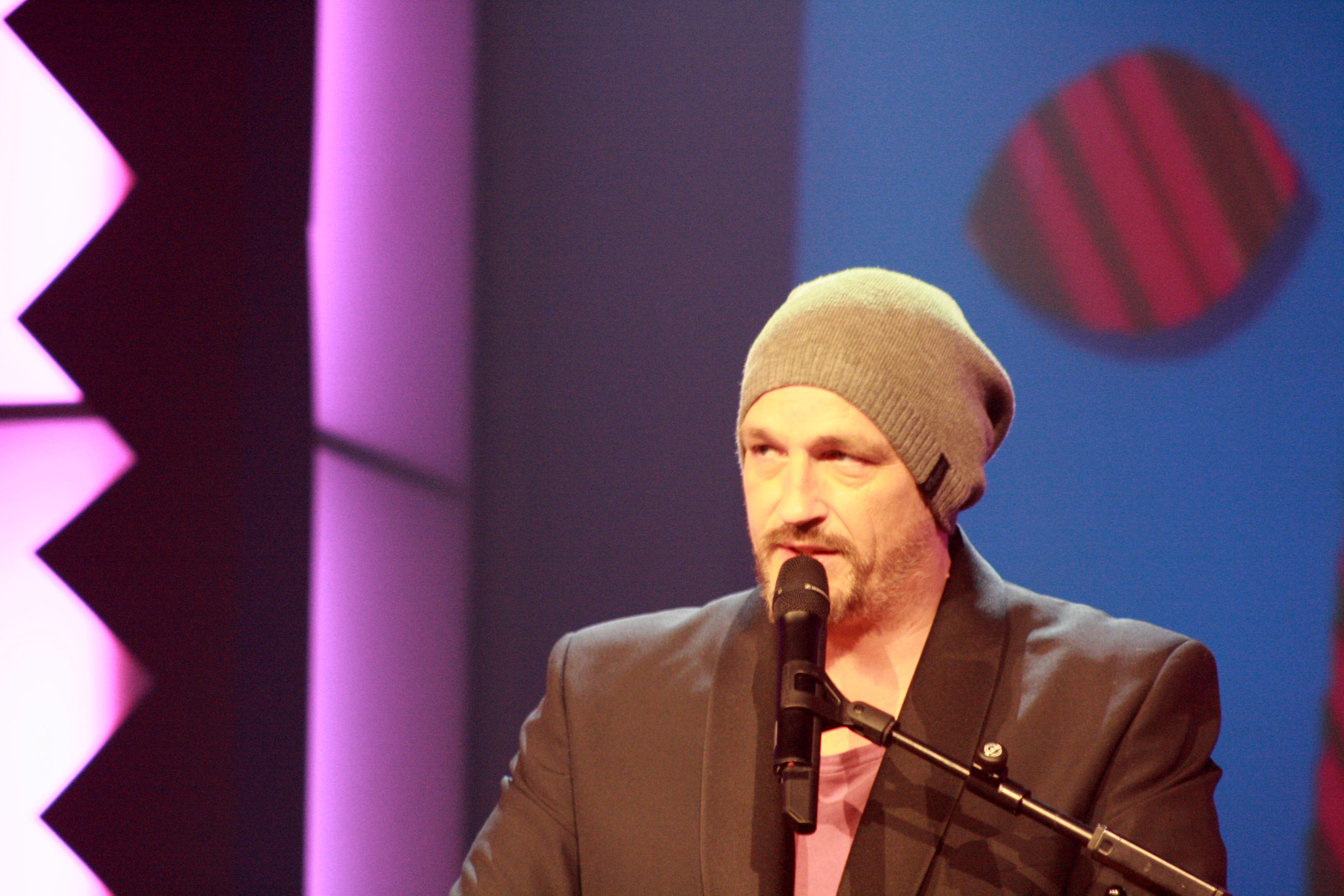 Autritt beim Wettbewerb 2013, Pantheon, Bonn.